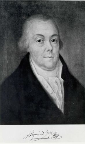 Žiga (Sigmund) Zois, Slovene nobleman, naturalist and industrialist.